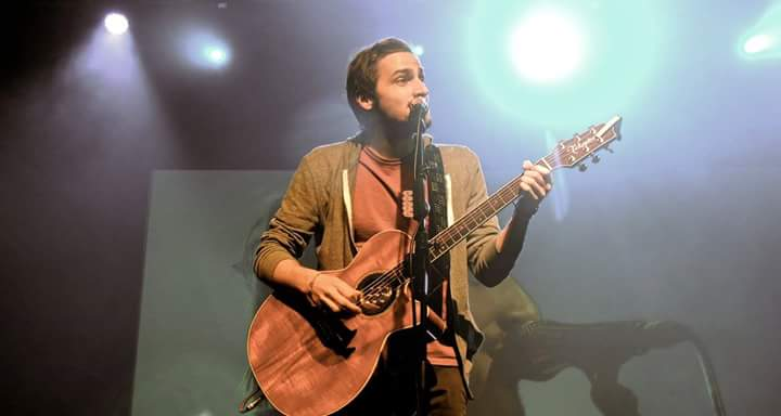 Kendall a Milano